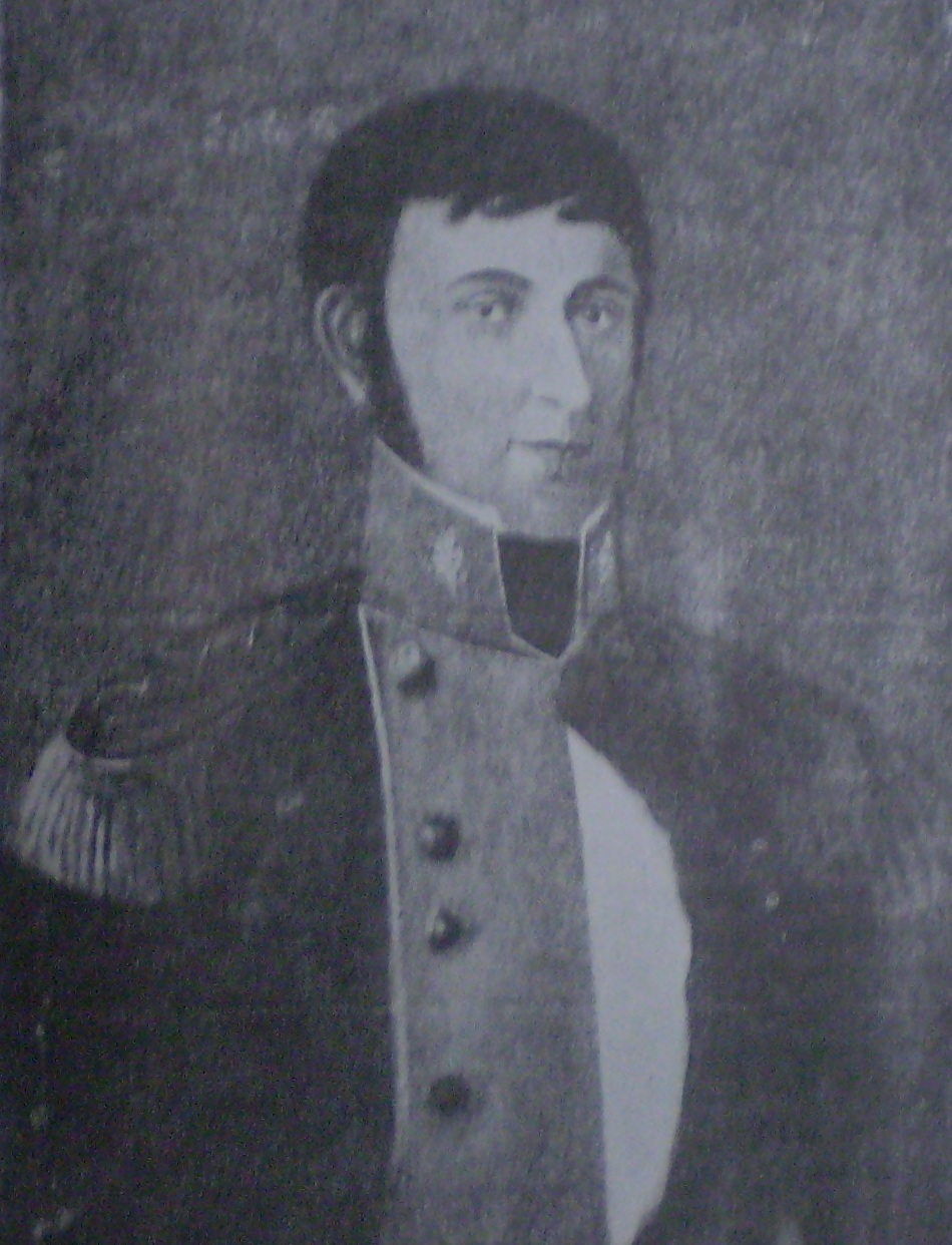 francisco Antonio Ortiz de Ocampo